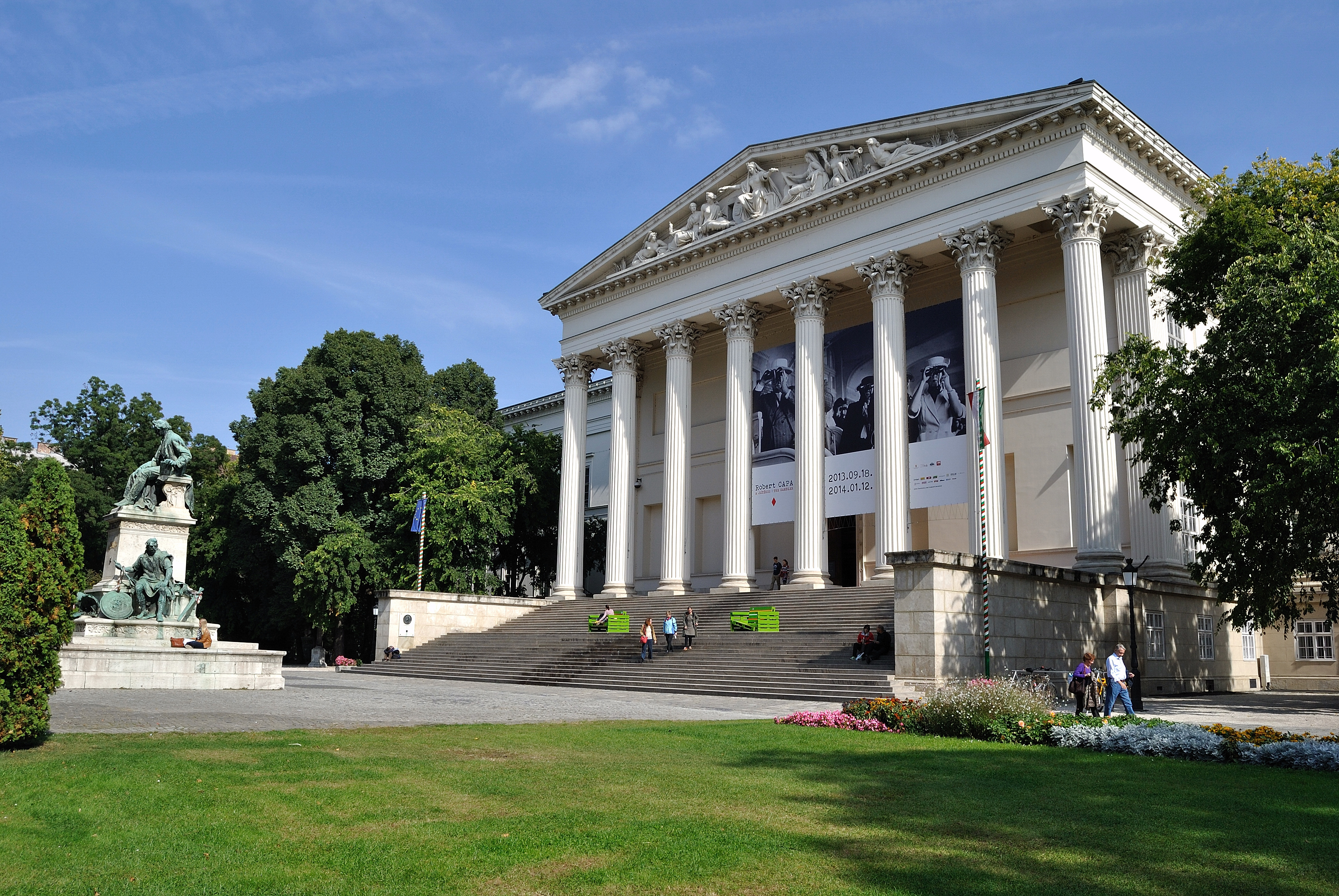 Magyar Nemzeti Múzeum This is a photo of a monument in Hungary. Identifier: 945